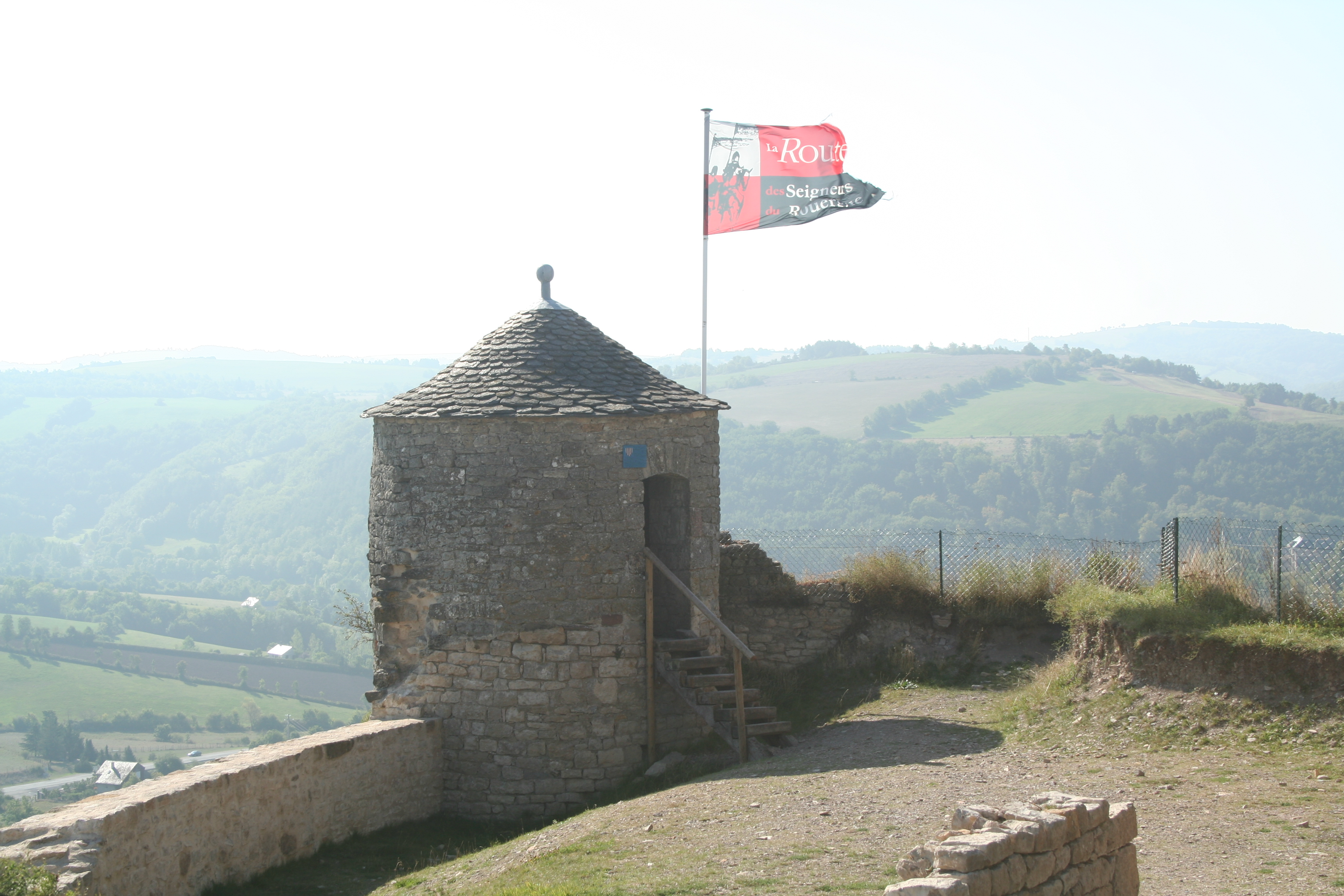 Sévérac-le-Château (Aveyron) - tourelle.